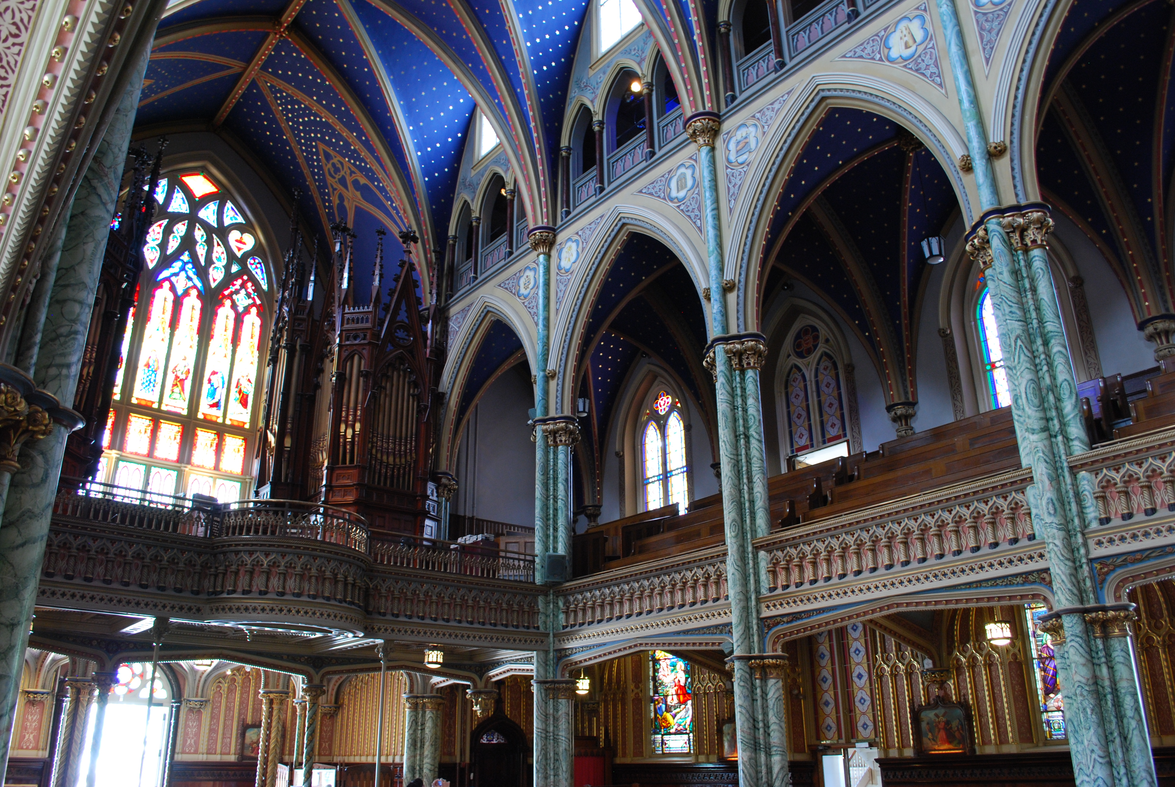 Entrée de la Basilique-Cathédrale Notre-Dame d'Ottawa